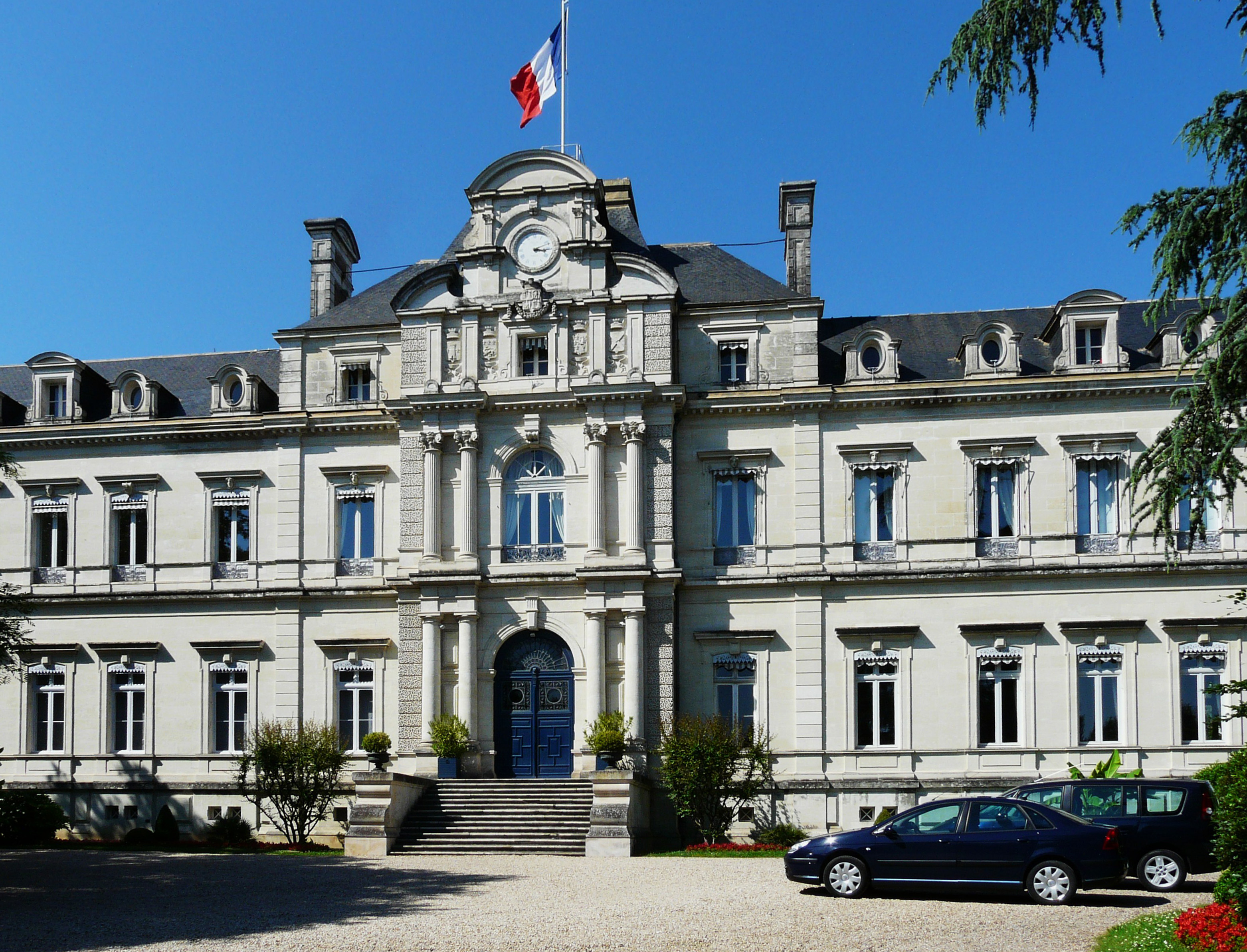 Le bâtiment de la Préfecture de la Dordogne à Périgueux Object location45° 11′ 12.2″ N, 0° 43′ 32.7″ E